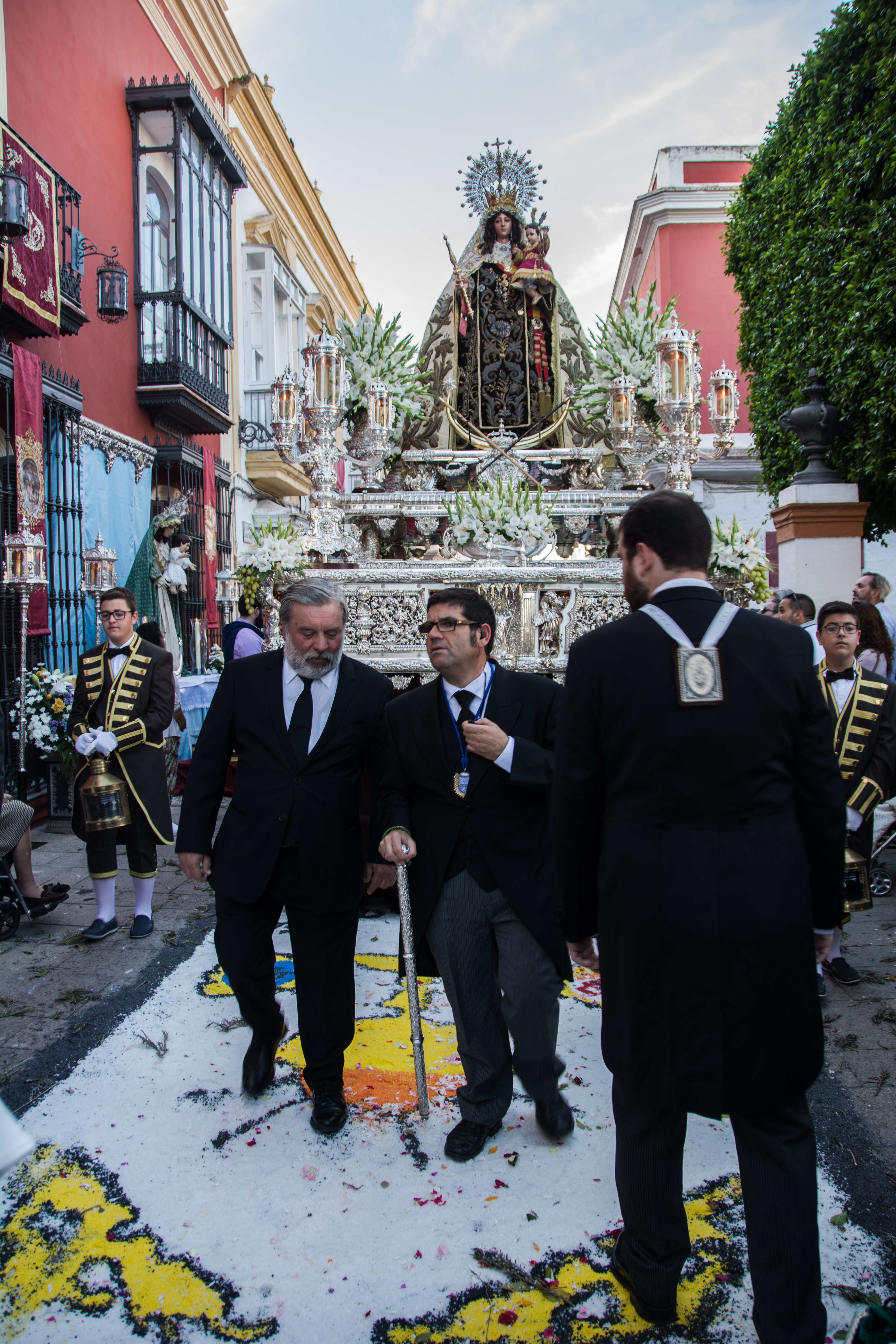 corpus